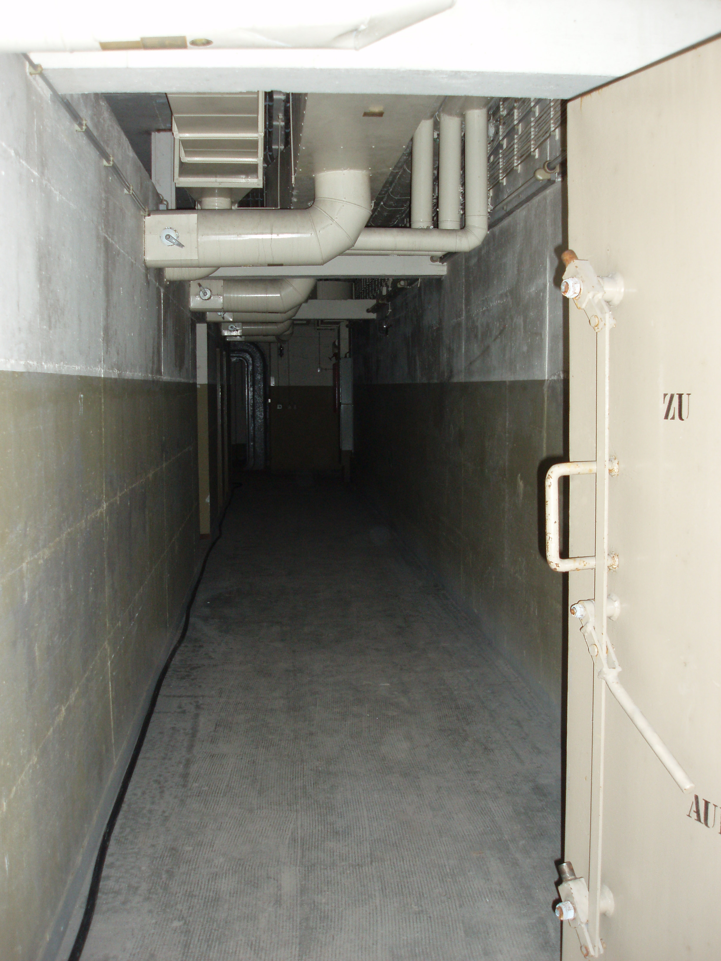 Gang im Regierungsbunker in Bad Neuenahr-Ahrweiler, an der Decke befinden sich die Rohre für die Zu- und Abluft.